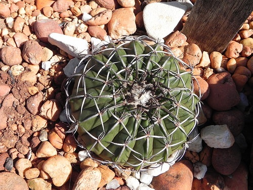 Near Diamantina MG Brasil